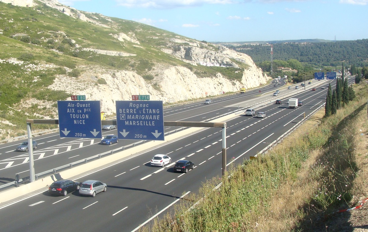 L'approche de la séparation des autoroutes A7 et A8 au sud du péage de Lançon-Provence, en venant du nord. Les voies A8 sont au centre, les voies A7 sont de part et d'autre.